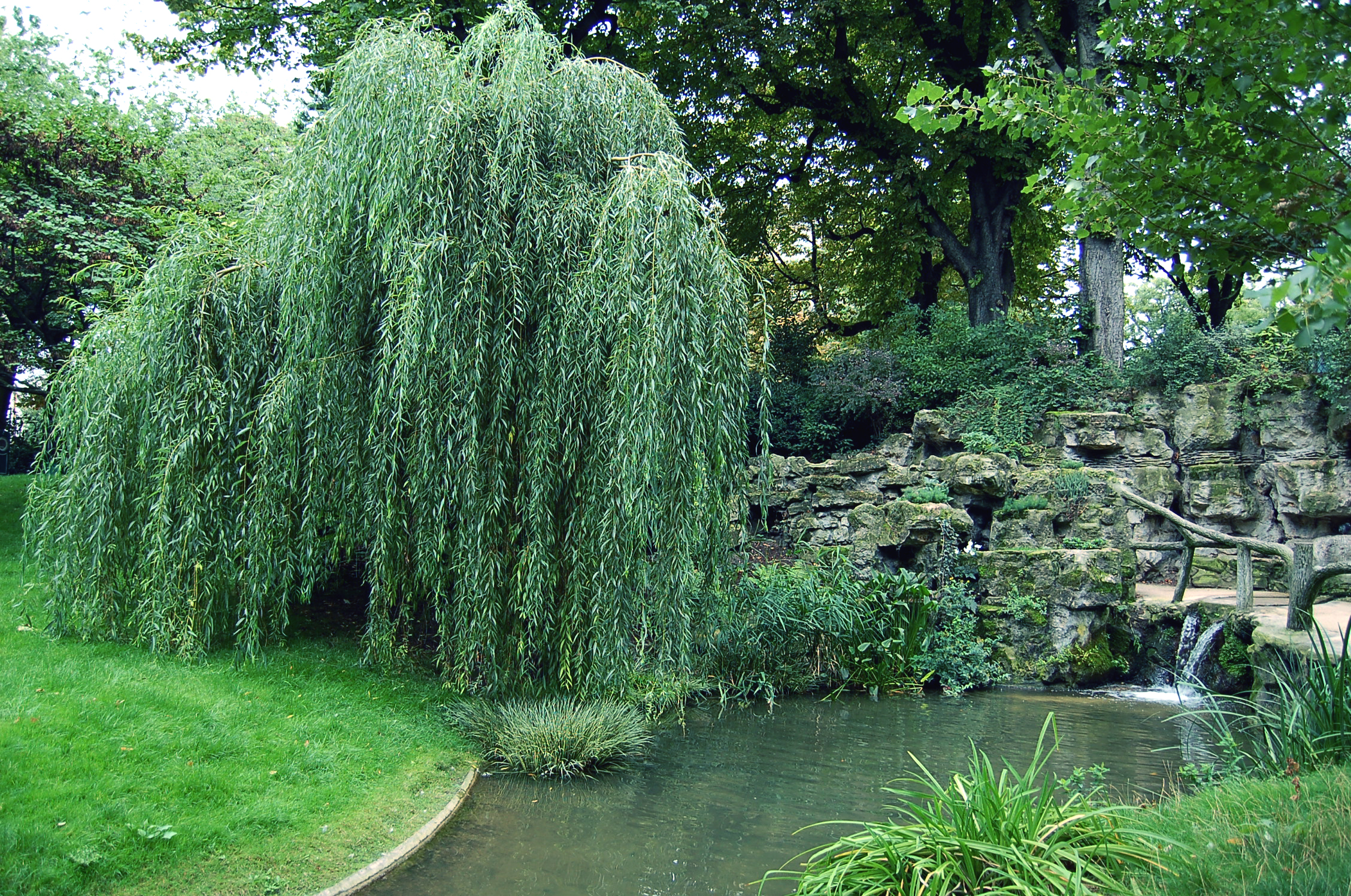 Saule pleureur - Salix × sepulcralis